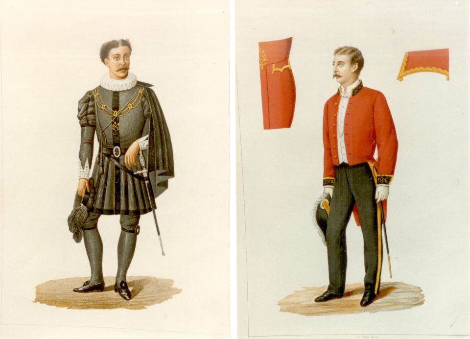 Divise di campagna (sinistra) e città (destra) del Cameriere Segreto (Alfonso Giorgi, 1824-03-07 - 1889-03-31) di Spada e Cappa di sua Santità Pio IX